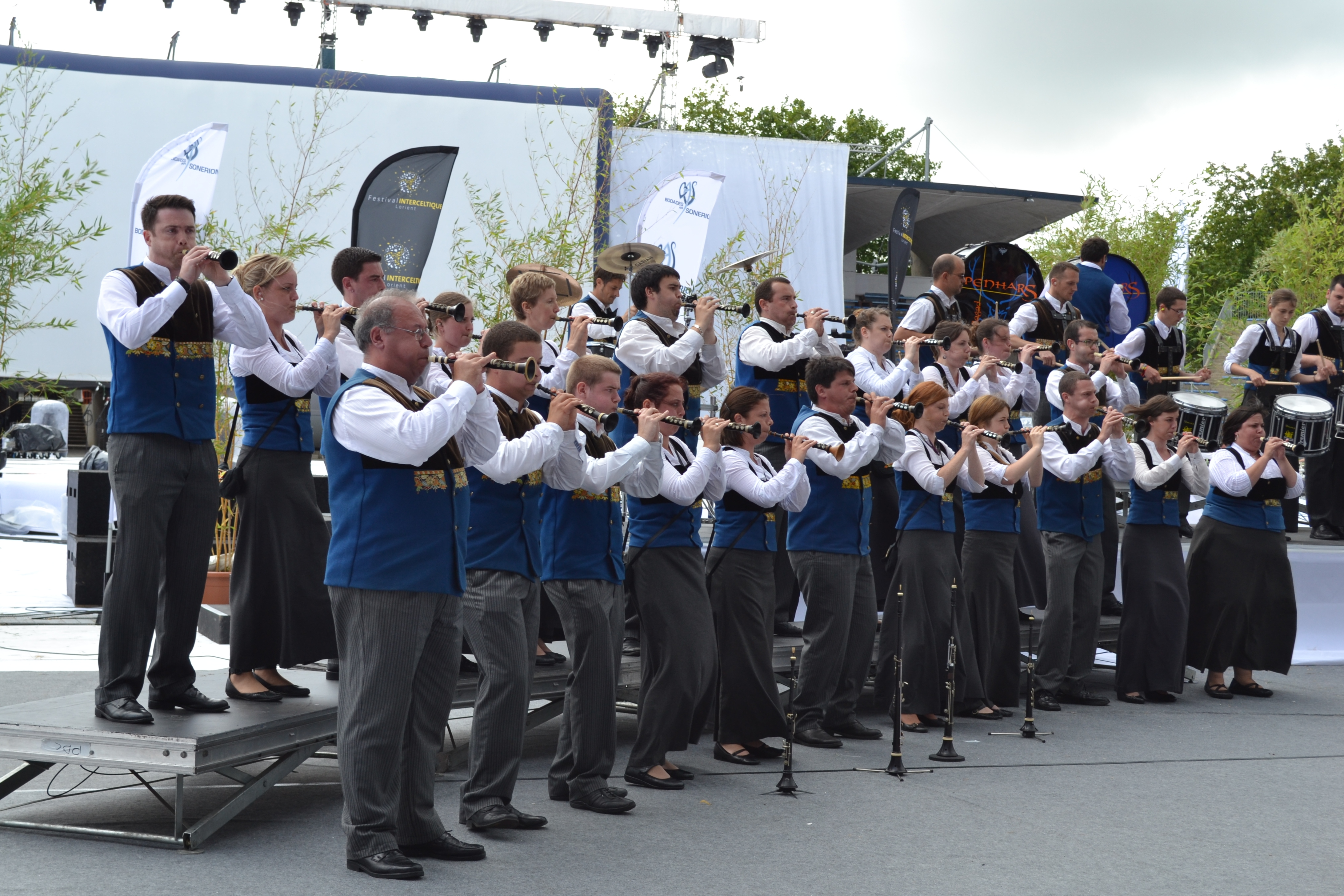 Le bagad Penhars sur scène au stade du Moustoir pour le championnat 1re catégorie, lors du Festival interceltique de Lorient 2012 (Morbihan, Bretagne).